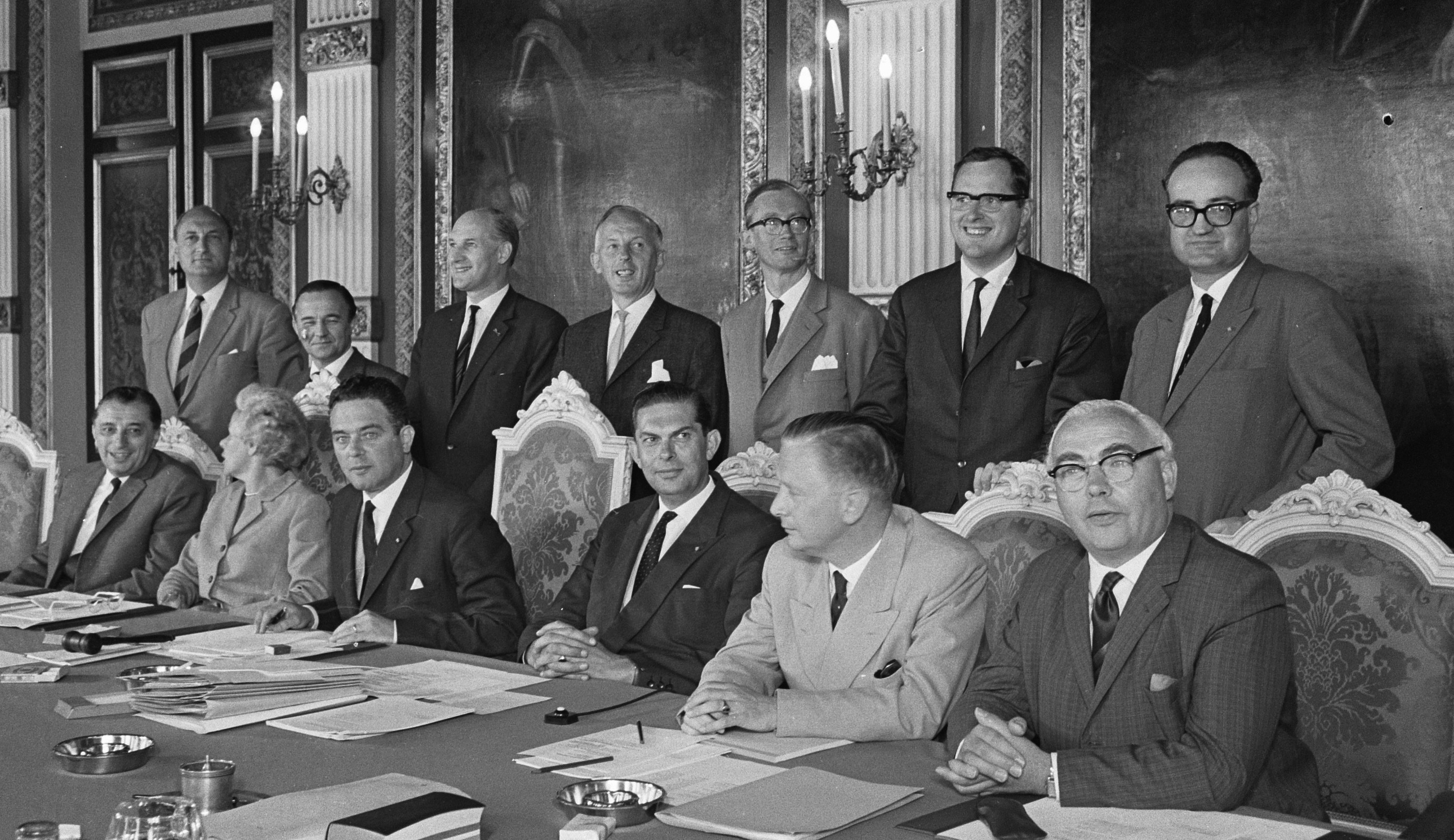 De bewindslieden van het kabinet-Marijnen in de Trêveszaal op 24 juli 1963